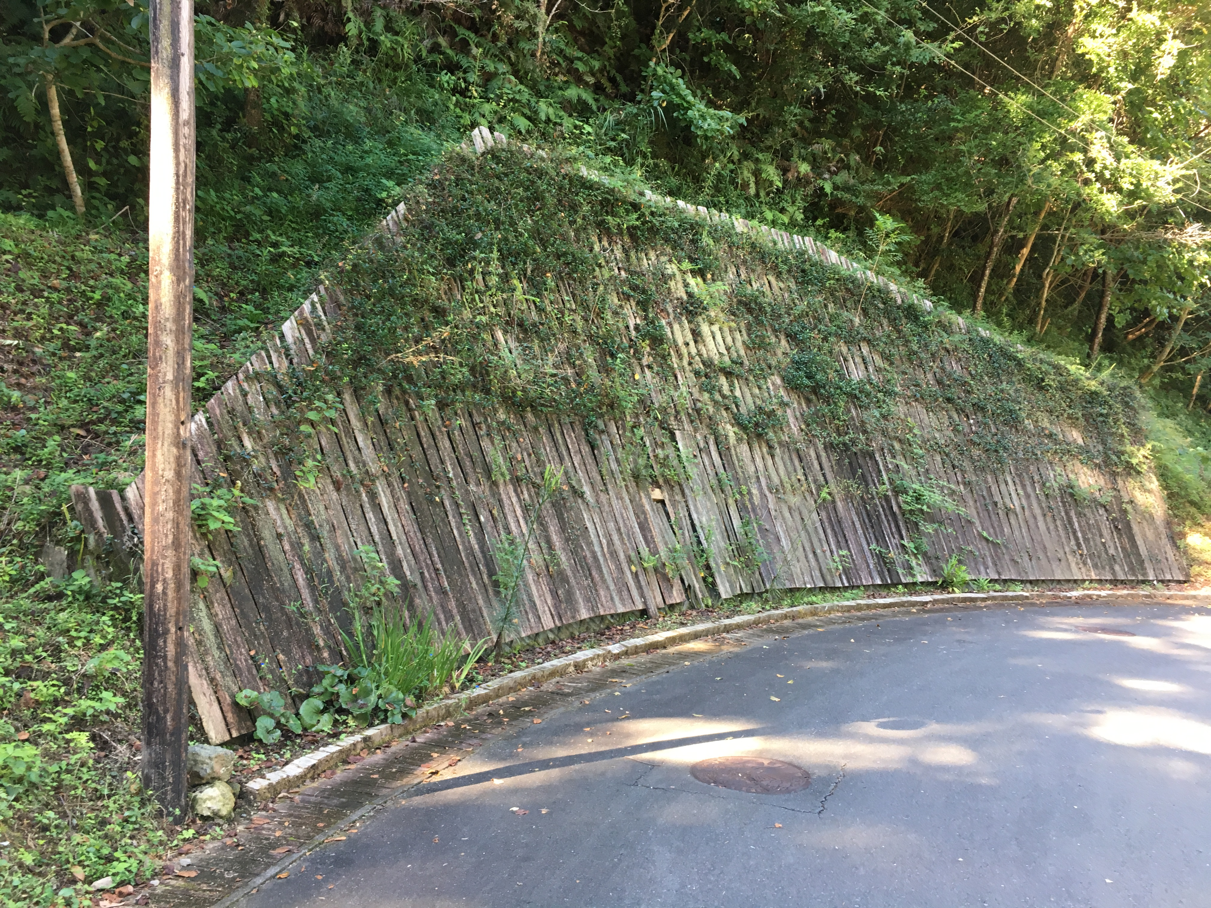 浜松市秋野不矩美術館（静岡県浜松市）擁壁